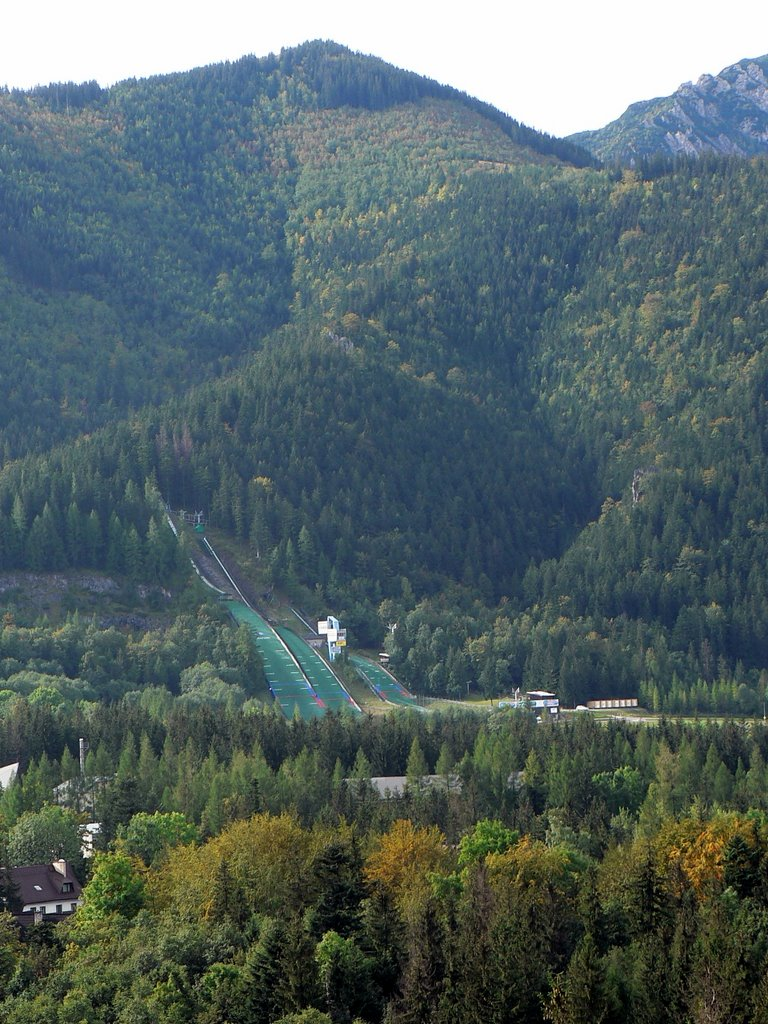 Krokiew ze skocznią narciarską na zboczu